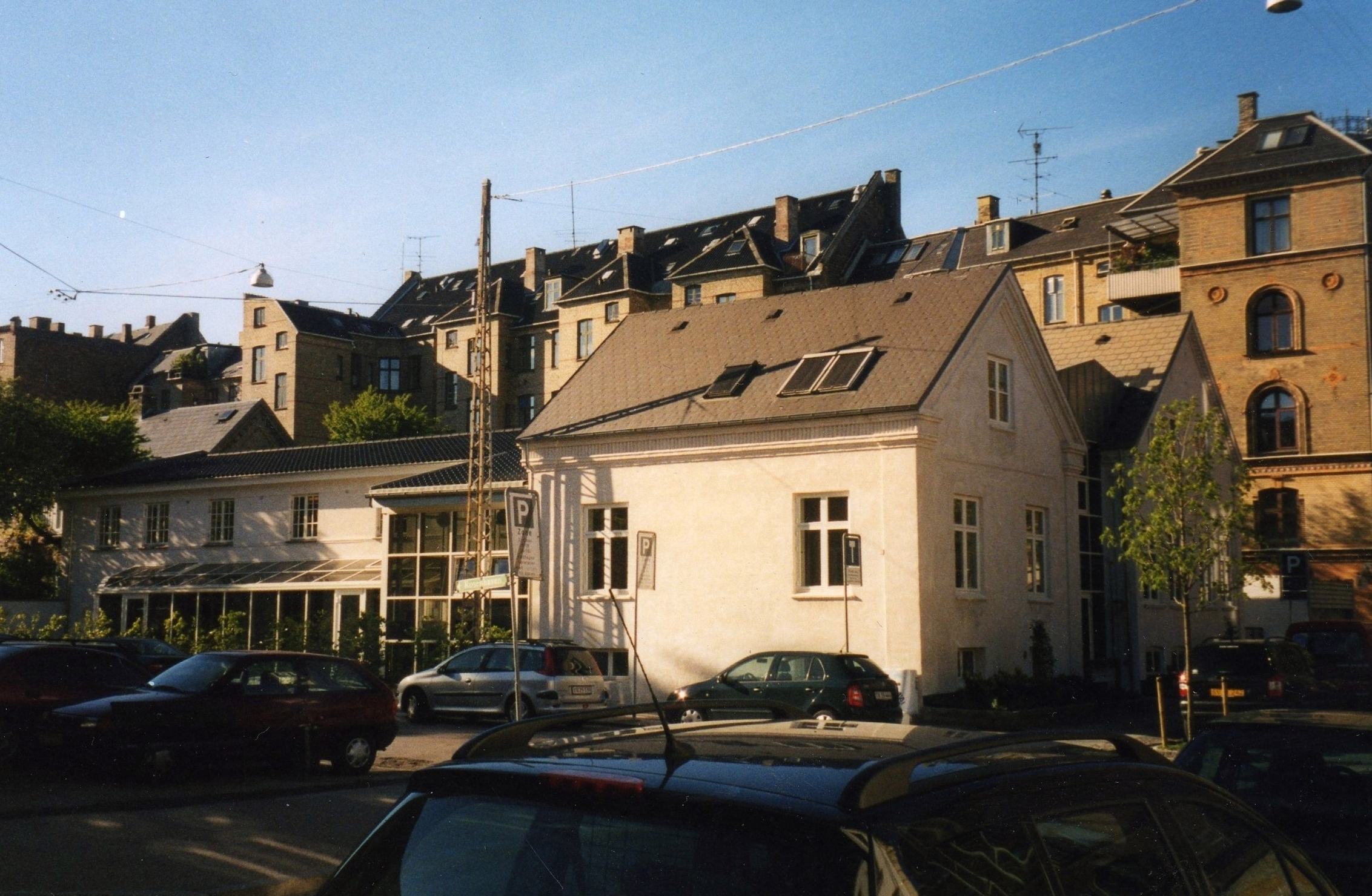 Jehovas Vidners Rigssal, Frederiksberg Kommune.